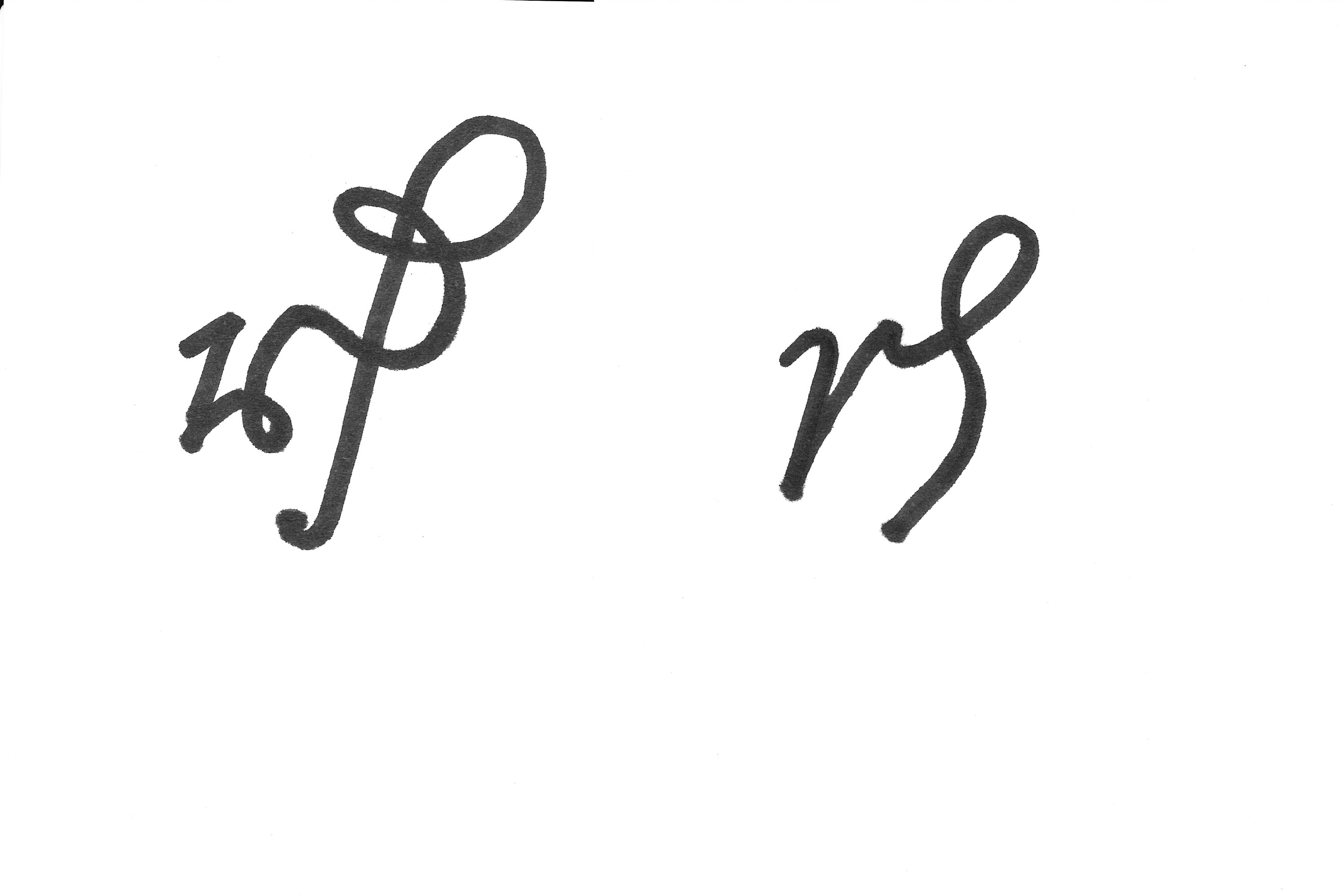 Abbreviatur für Reichstaler. Von den beiden Varianten wurde die linke auch im Buchdruck verwendet.